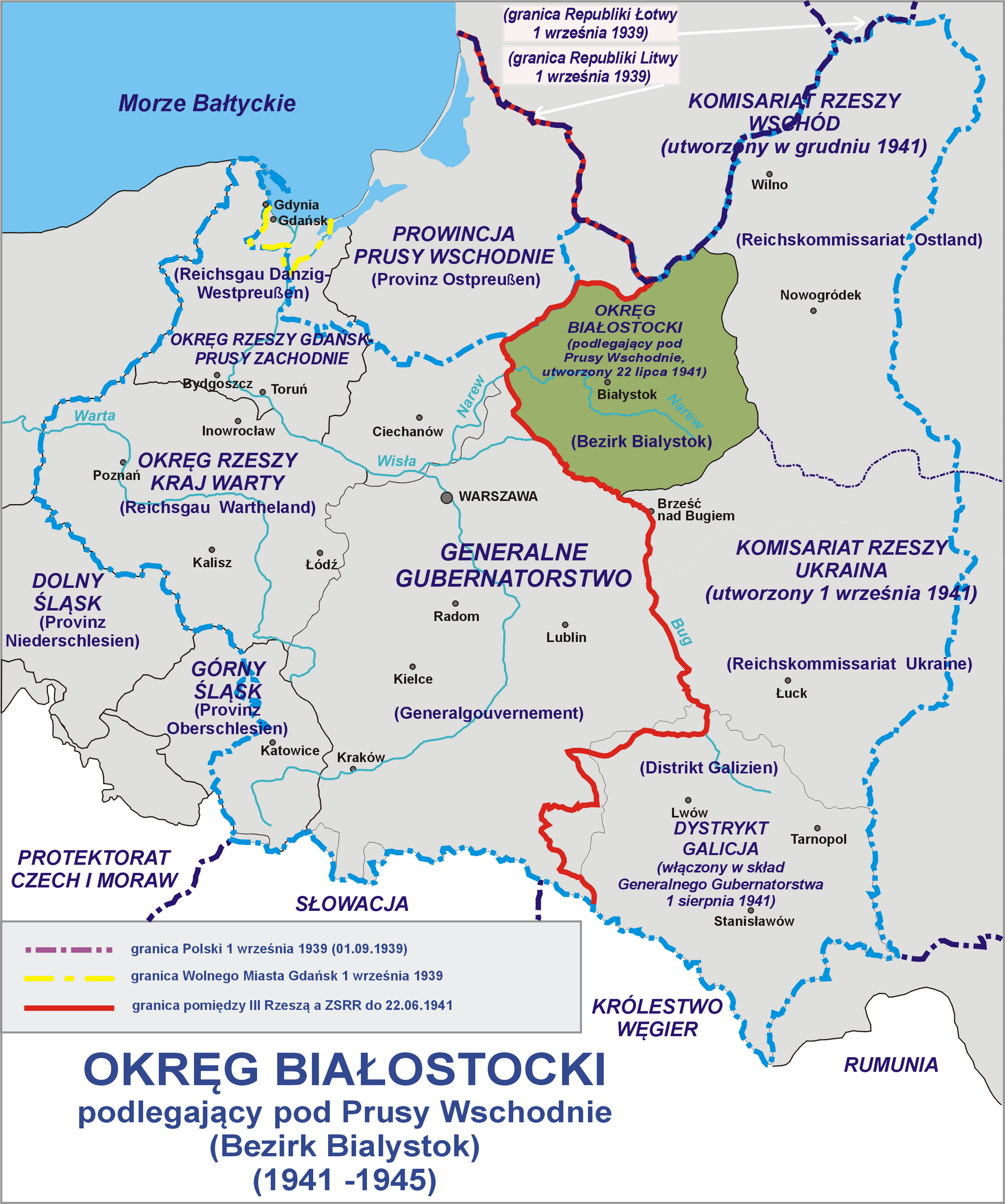 Bezirk Bialystok - Okręg Białostocki podlegający pod Prusy Wschodnie (1942 -1945).